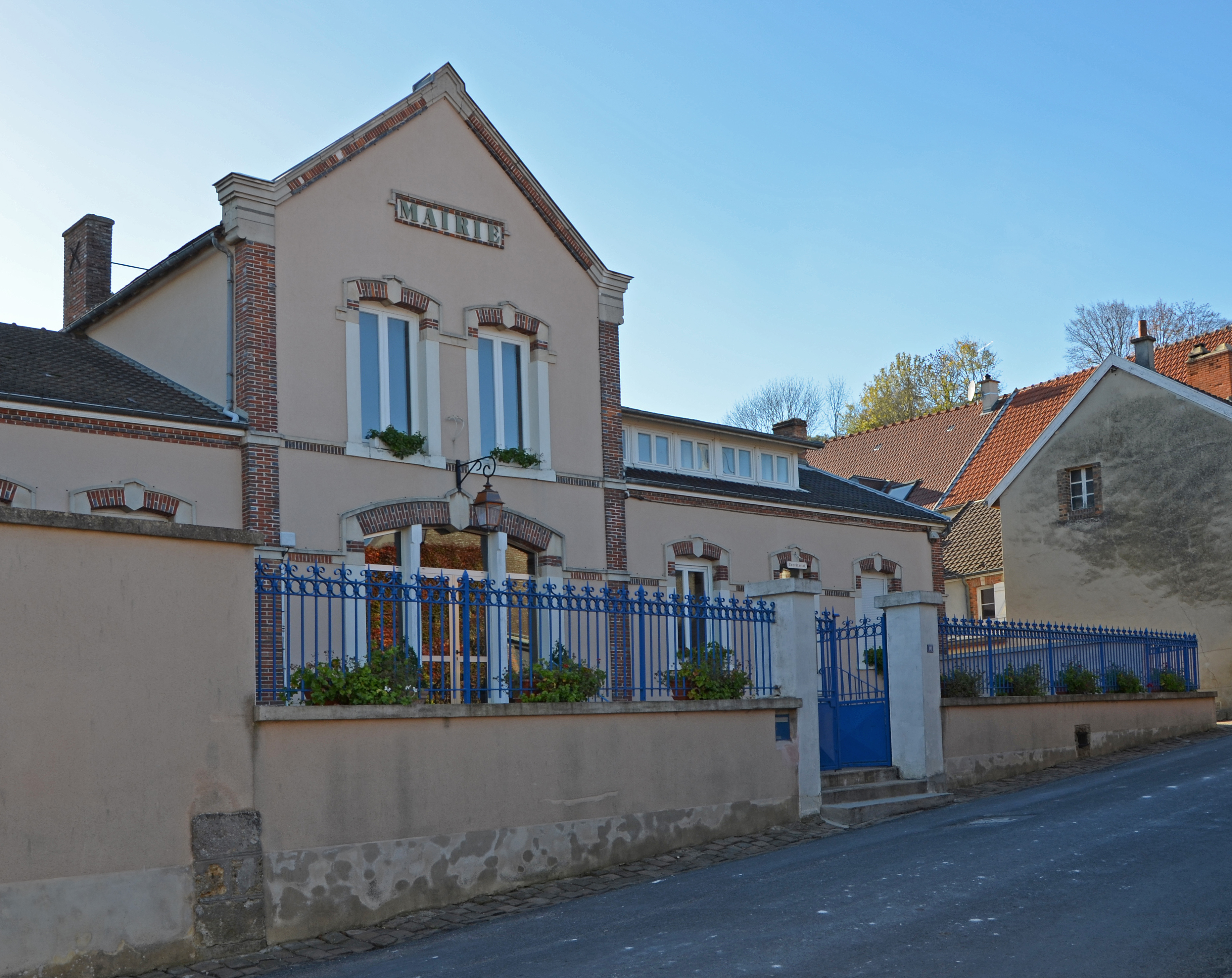 Mairie de Fleury-la-Rivière, Marne, Champagne-Ardennes, France